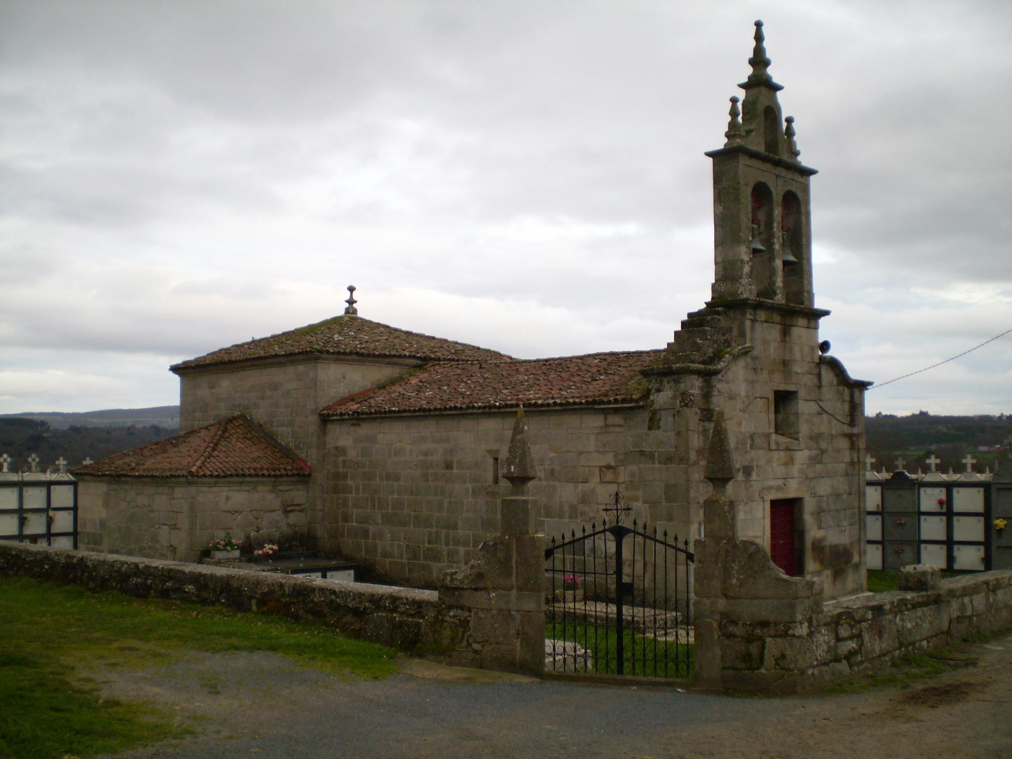 Igrexa parroquial de Casa de Naia (Antas de Ulla)